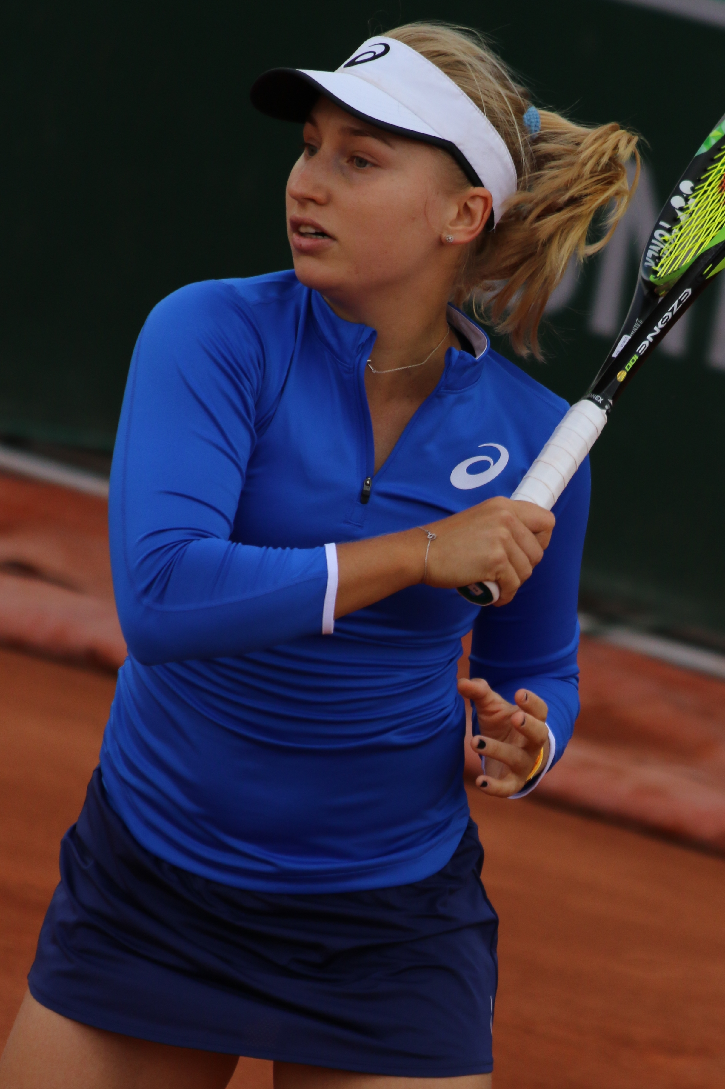 Gavrilova RG19 (10)